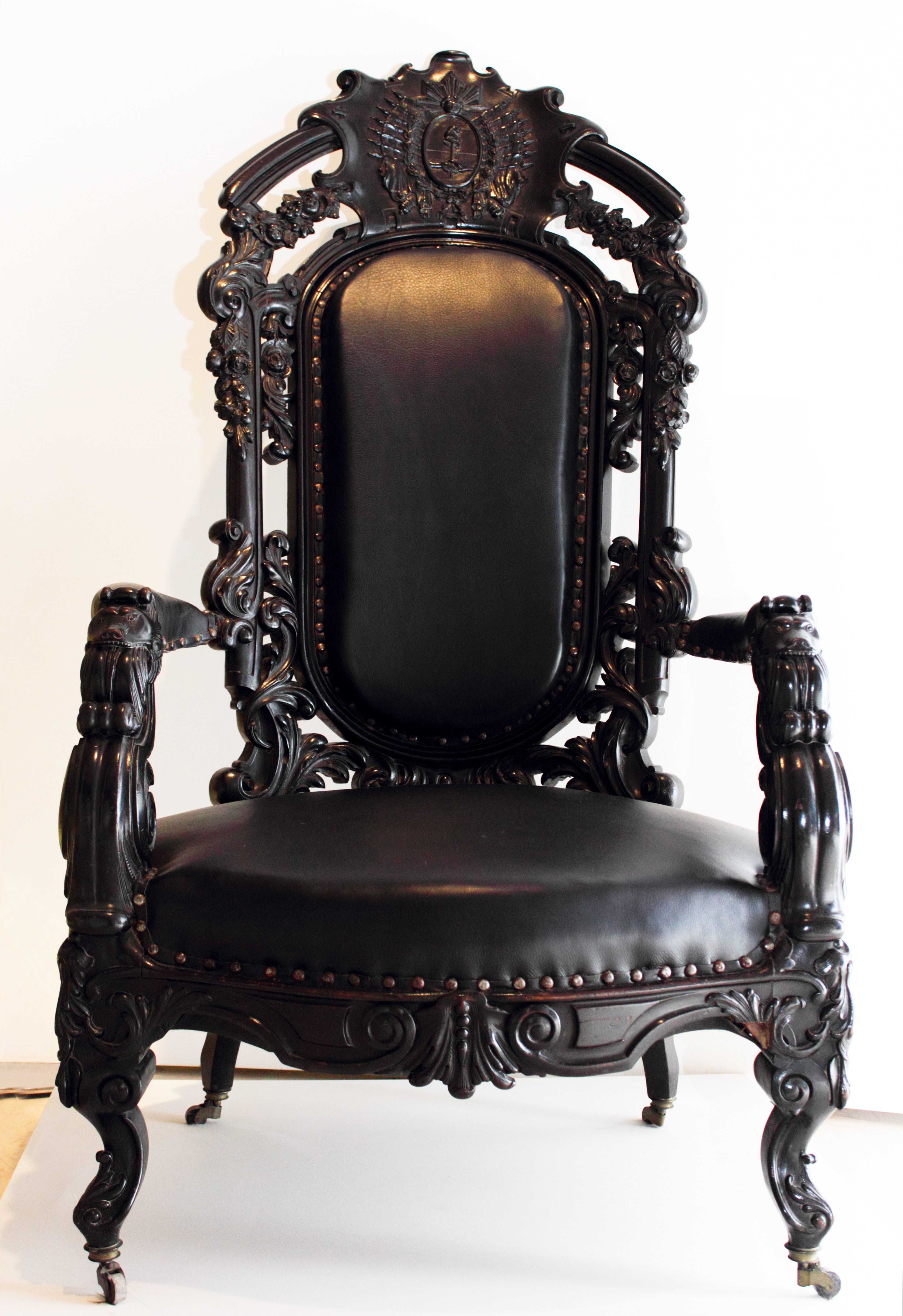 Sillón presidencial utilziado por el Presidente Santiago Derqui de 1860 a 1861, constituye el primer exponente de sillón de mando utilizado por un Primer Mandatario argentino. Tallado en el respaldo el mueble ostenta el Escudo de la Confederación Argentina. El habitualmente denominado "Sillón de Rivadavia" -que nunca existió como objeto ni como símbolo de mando- es un mito instalado en el inconsciente colectivo nacional, que alude simbólicamente al cargo de Presidente de la Nación.